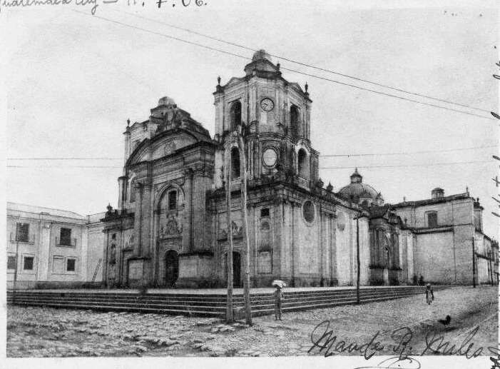 Iglesia de la Merced de la Ciudad de Guatemala en 1906.